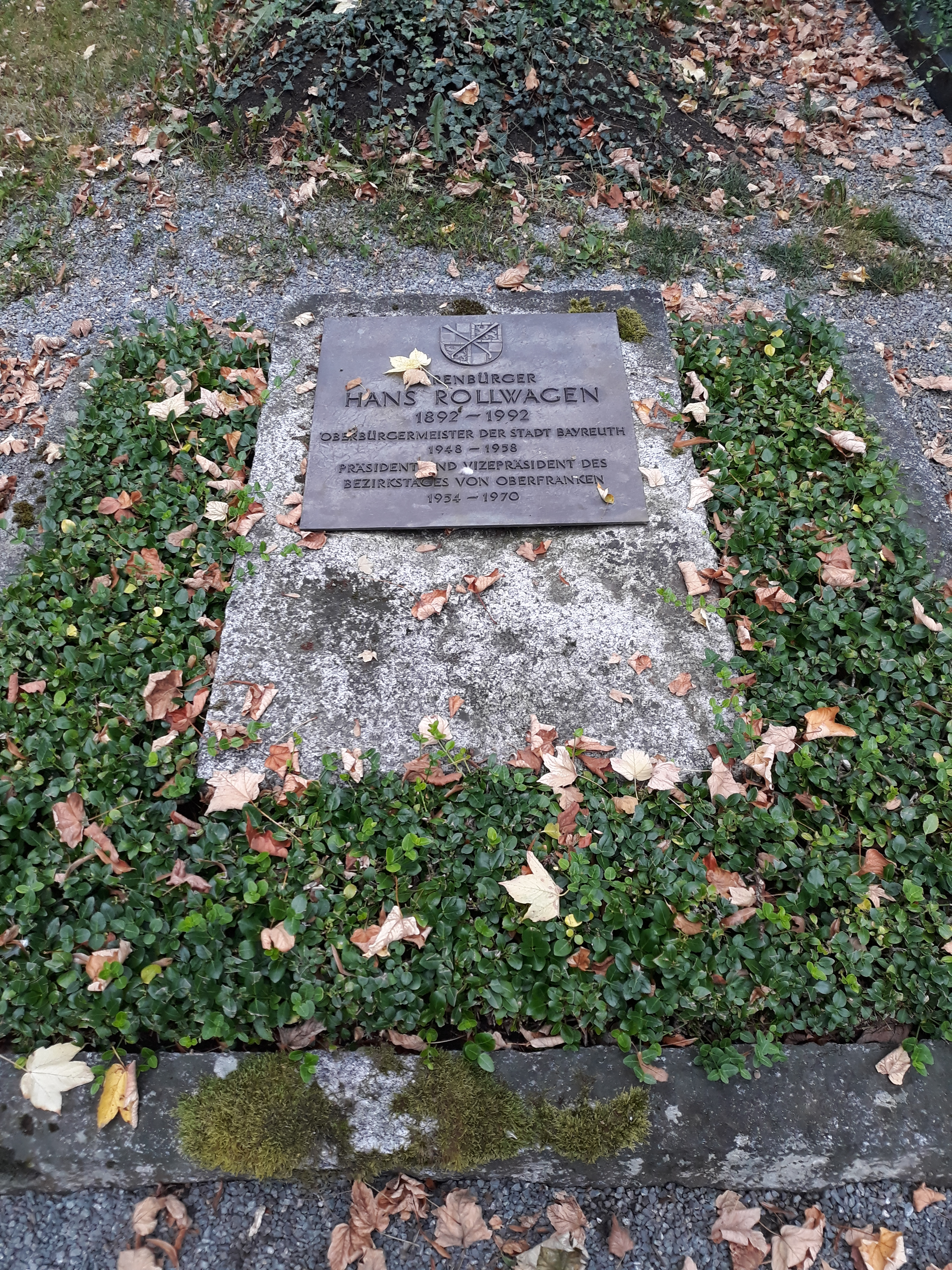 Das Grab des Bayreuther Oberbürgermeisters Hans Rollwagen auf dem Stadtfriedhof Bayreuth.